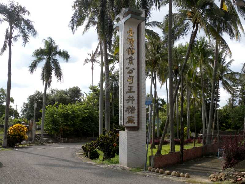 臺南玉井糖廠。